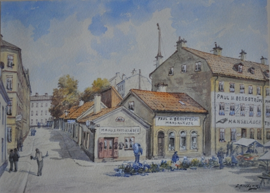 Akvarell av Einar Hillberg föreställande gamla byggnader runt Hötorget.